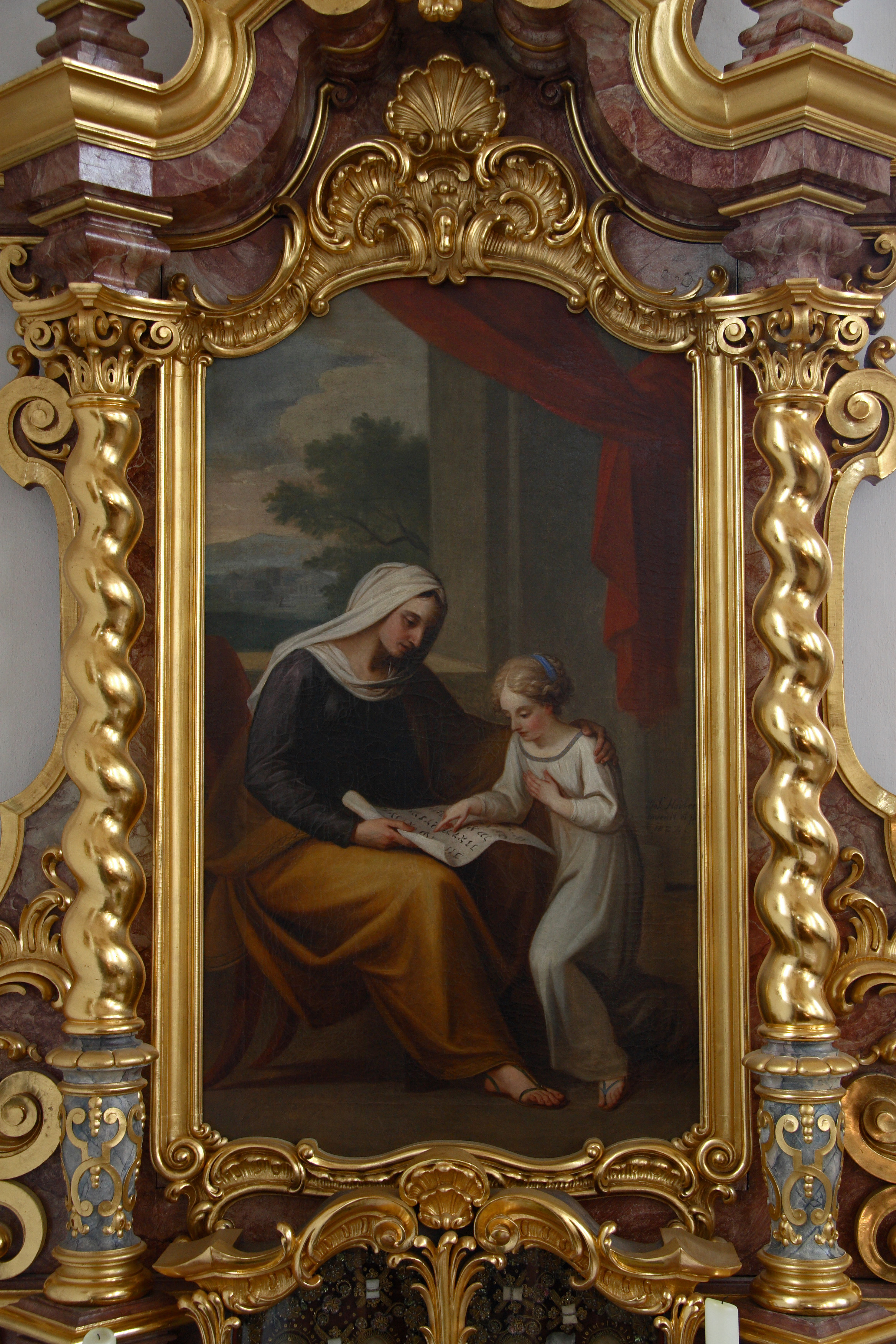 Gemälde, signiert 1822, von Joseph Hauber (1766-1834) in einem Seitenaltar der Pfarrkirche St. Vitus in Iffeldorf